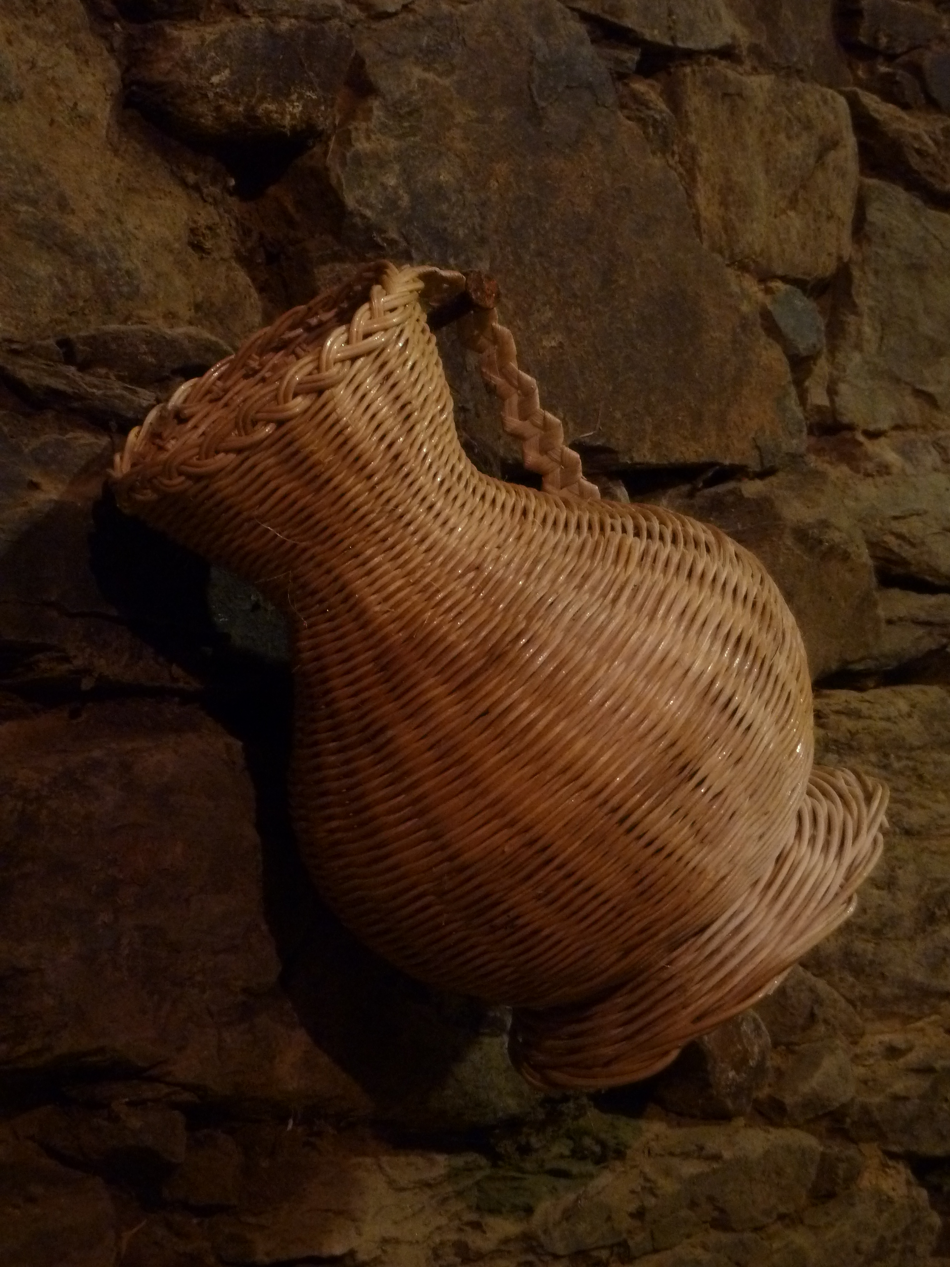 Xerra feita con técnicas de cestaría. Exposición de cestaría no belén vivinte de Bribes, Cambre.